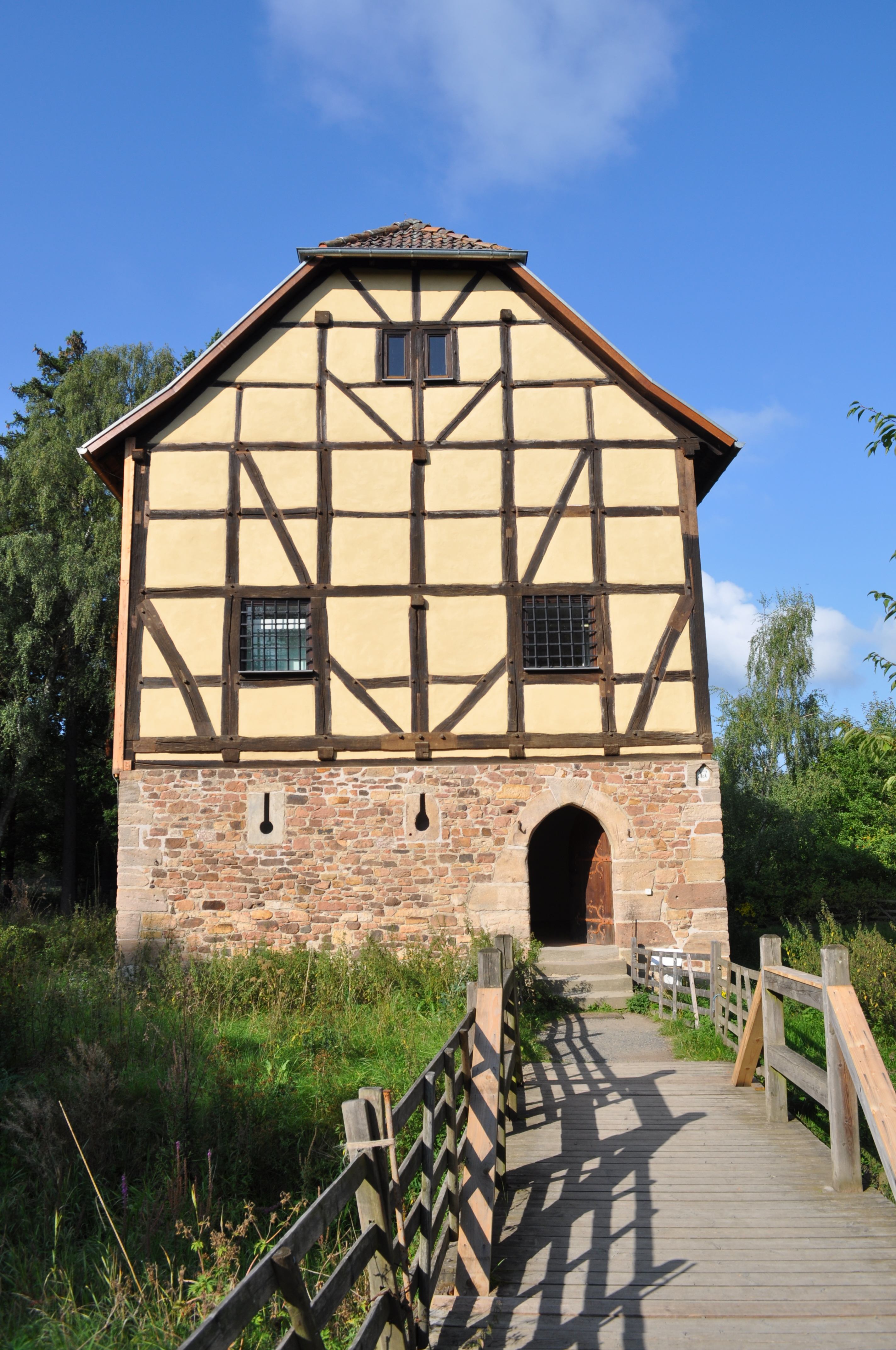 Hessenpark, „Festes Haus“ aus Ransbach, Front